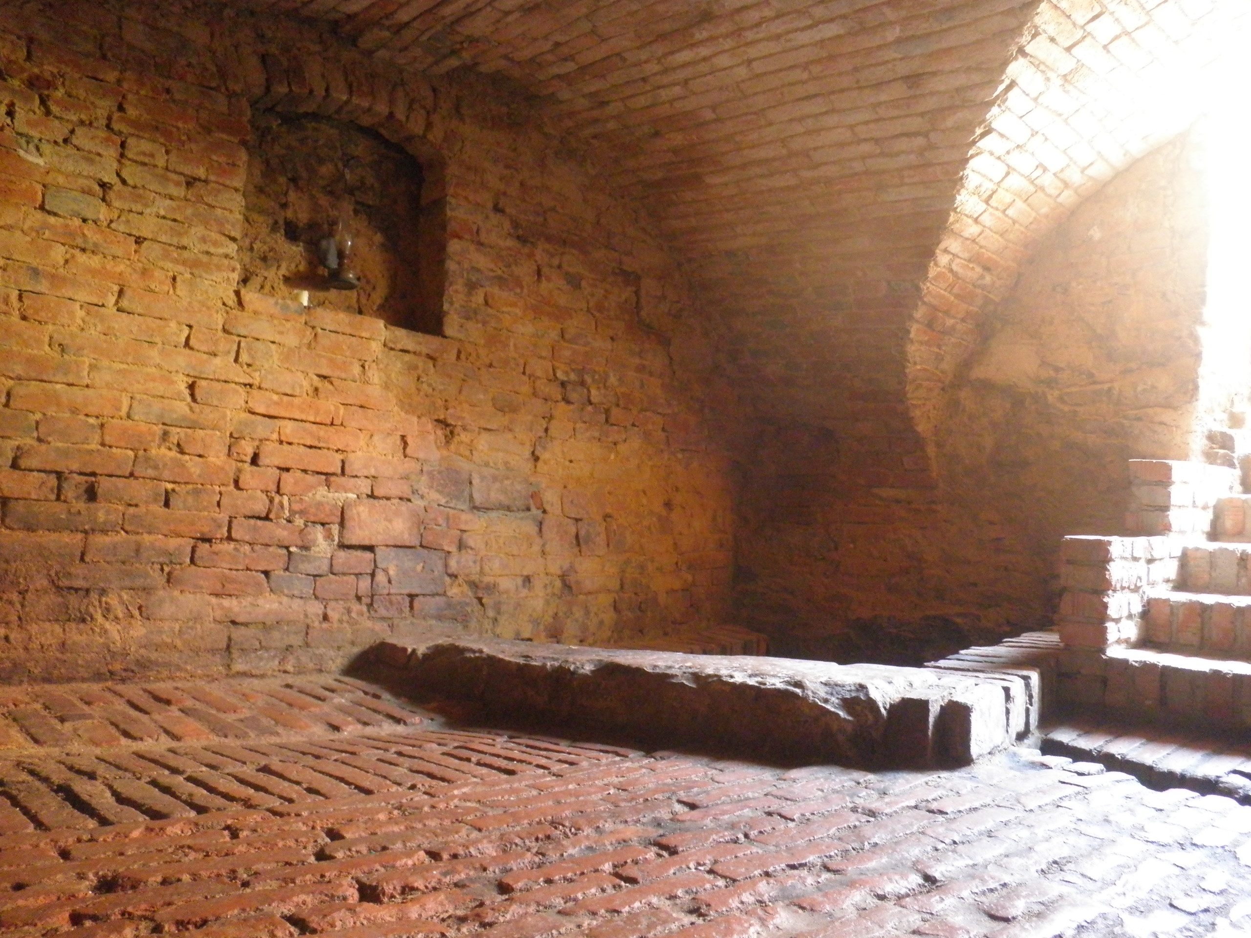 Interiér mikve v Boskovicích